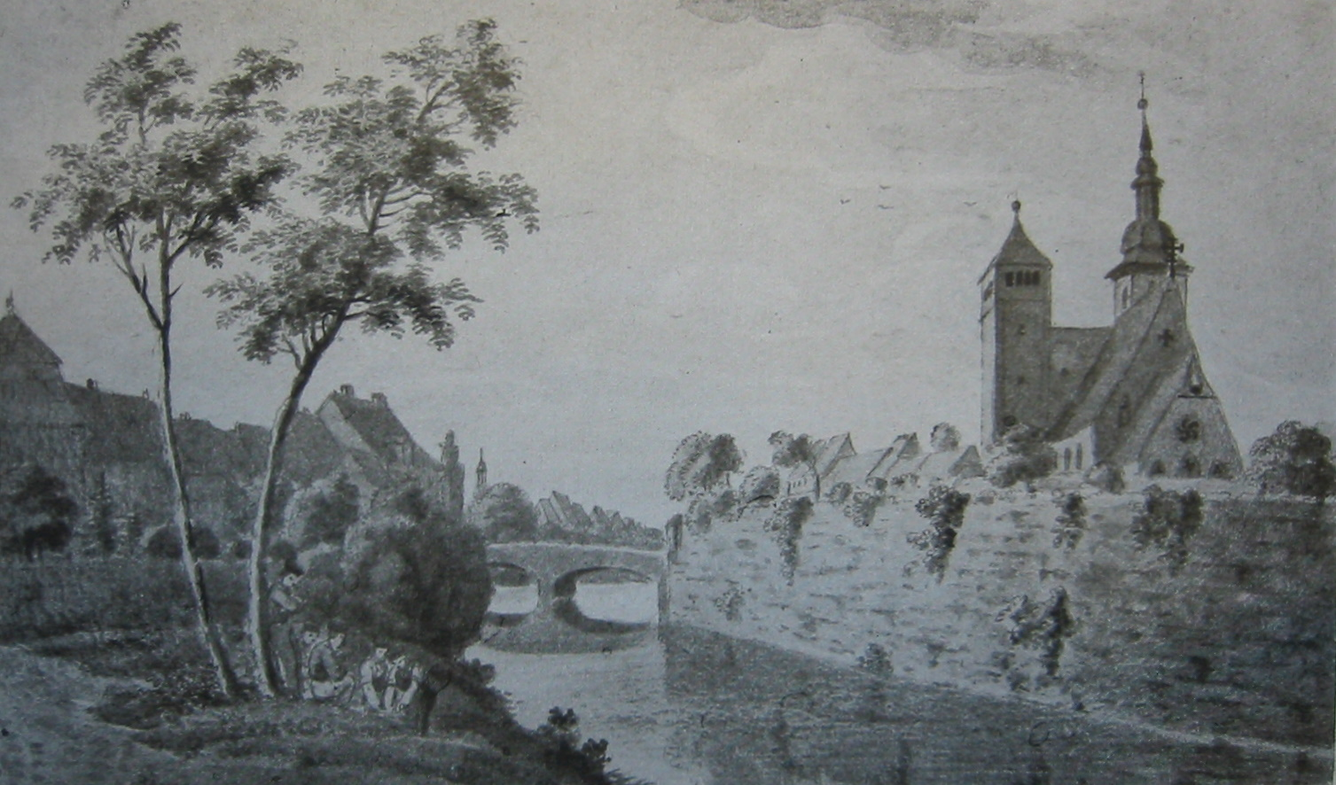 Reglerkirche Erfurt about 1800